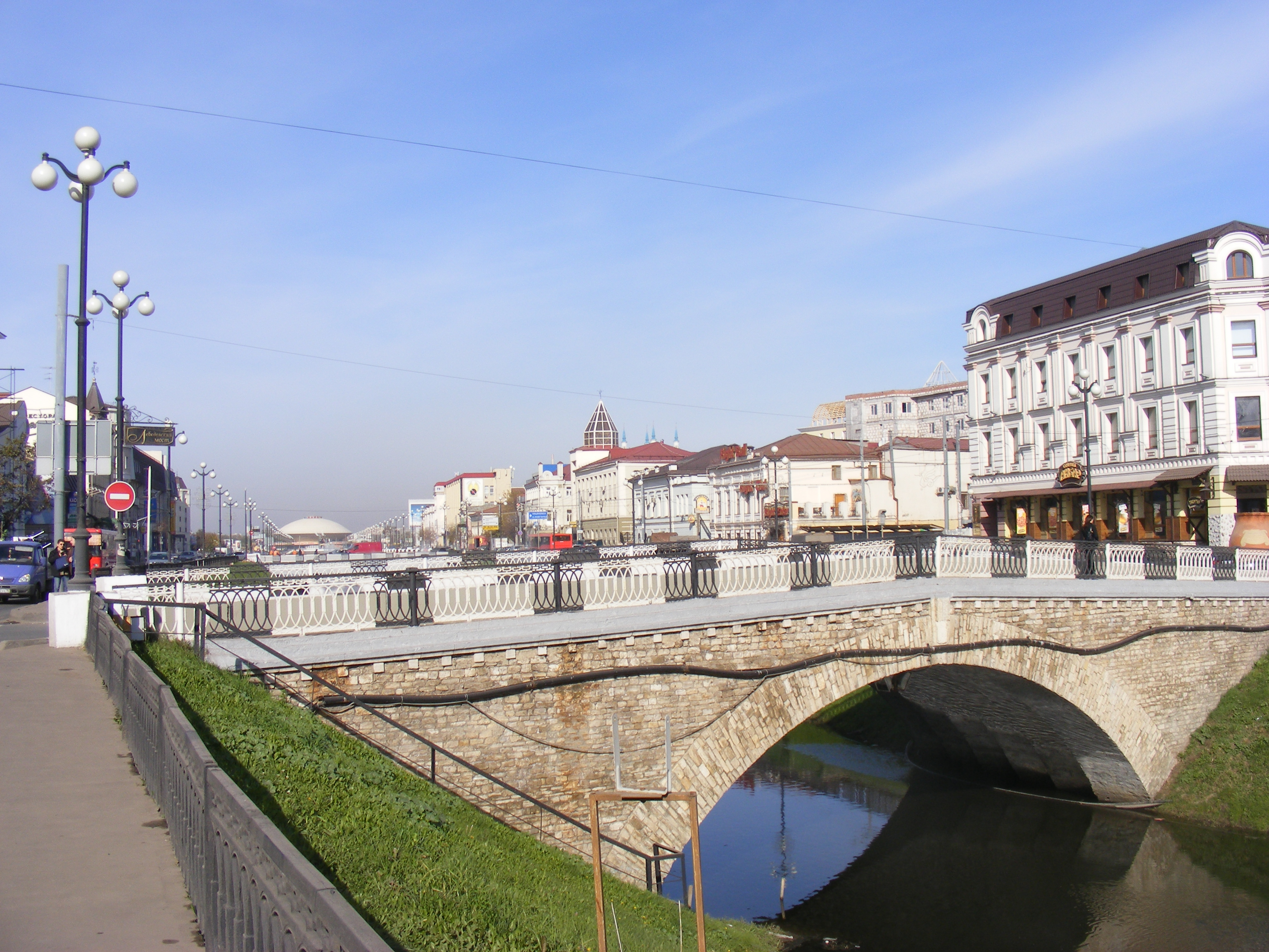 Lebedevskiy bridge over Bolaq channel in Kazan, Tatarstan, Russia.